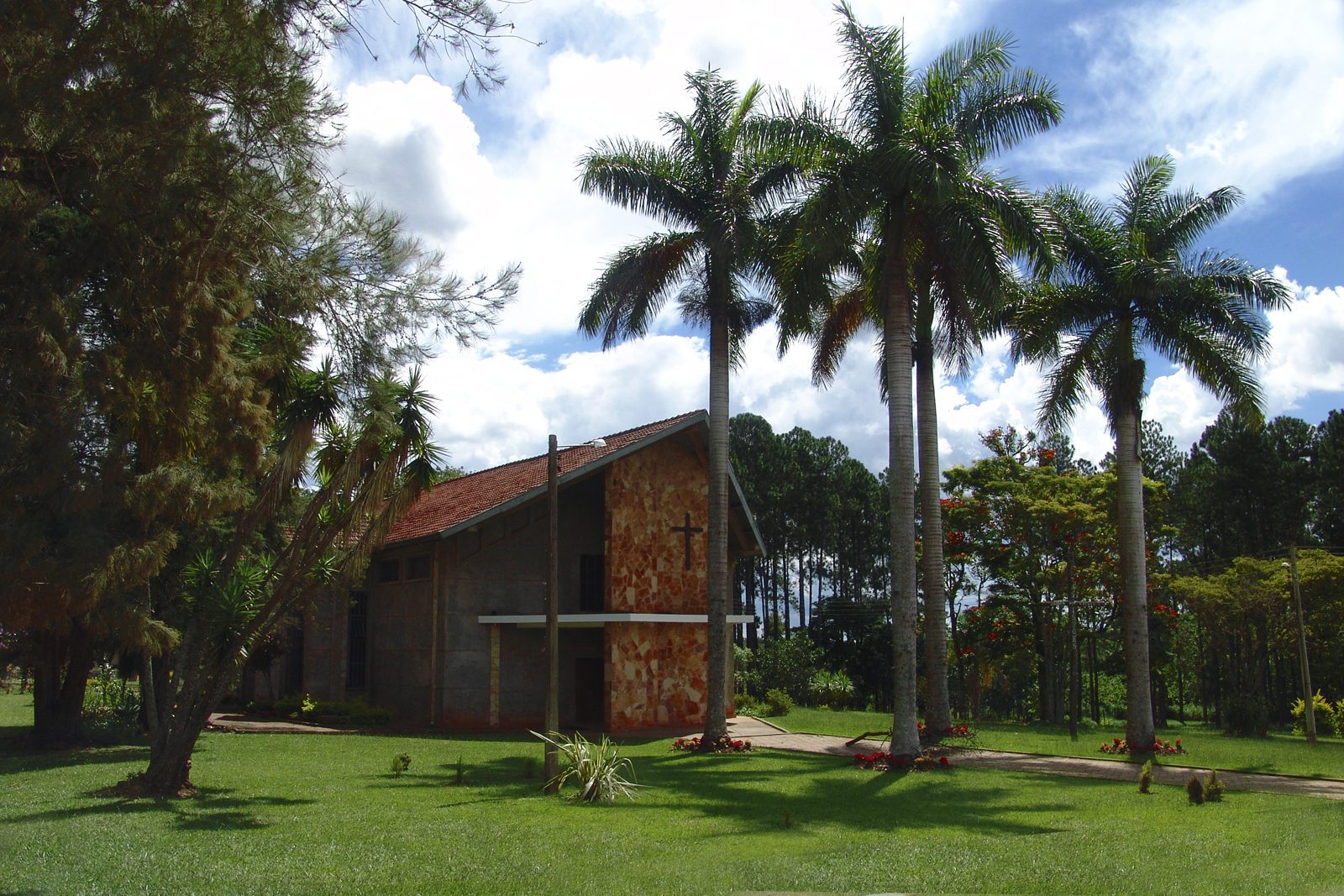 Capela (Igreja) no Distrito de Holambra II, Paranapanema, São Paulo, Brasil